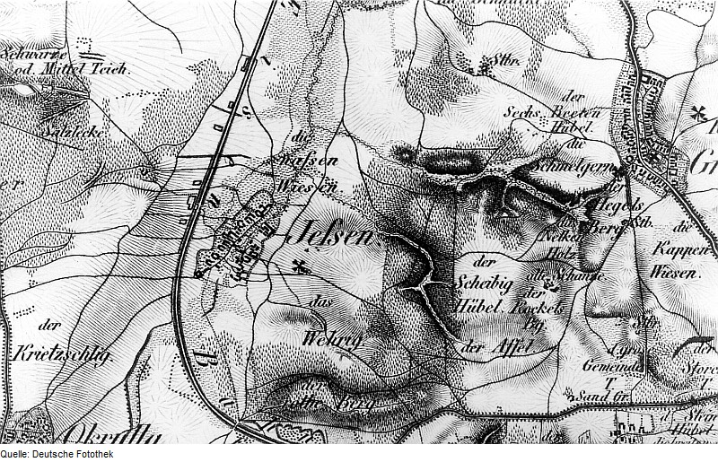 Original image description from the Deutsche Fotothek Niederau-Jessen. Oberreit, Sect. Großenhain, 1841/43